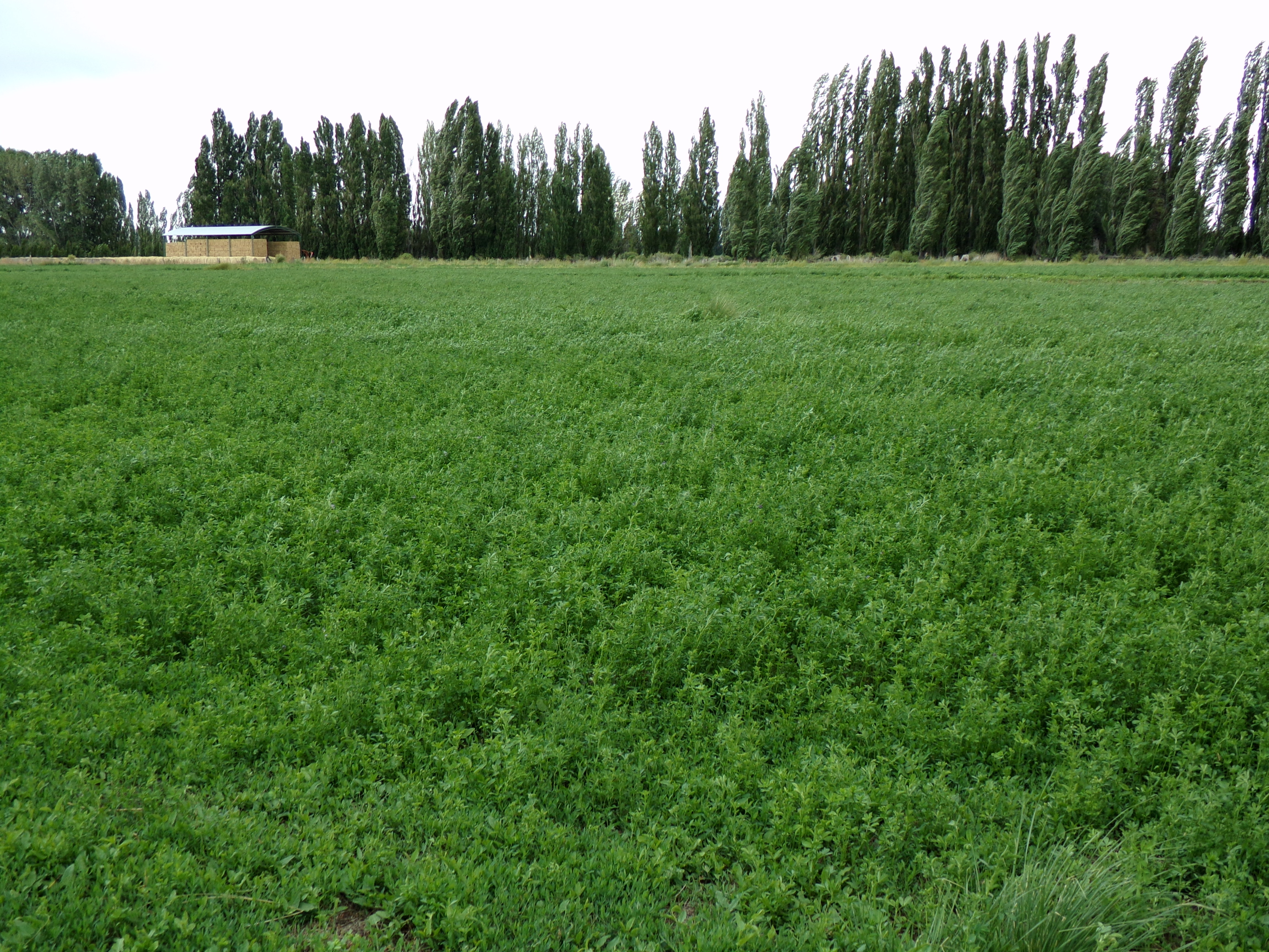 Cultivo de alfalfa en el valle del Chubut, Patagonia, Argentina